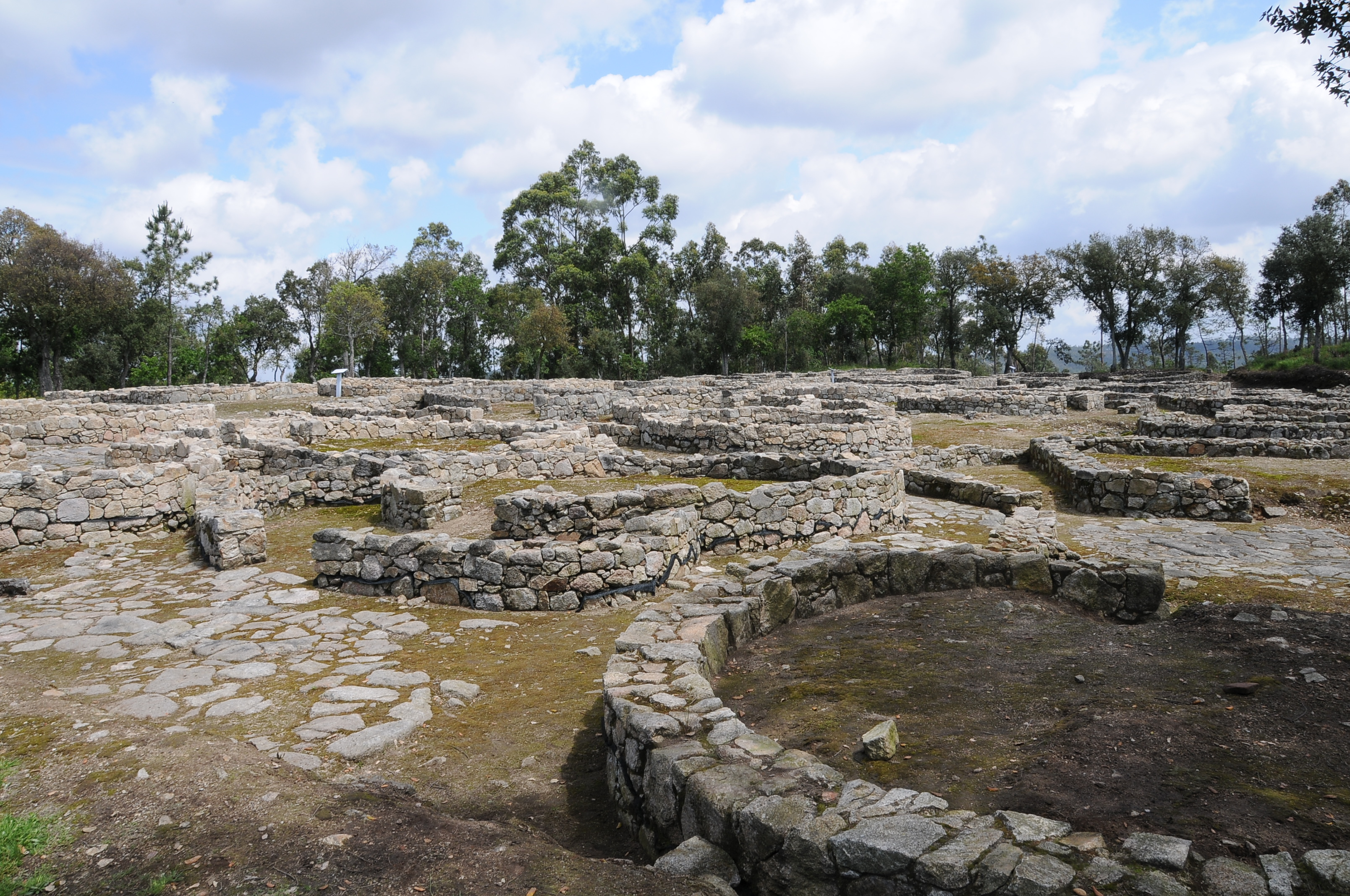 Cividade de Terroso in Terroso, Povoa de Varzim, Portugal